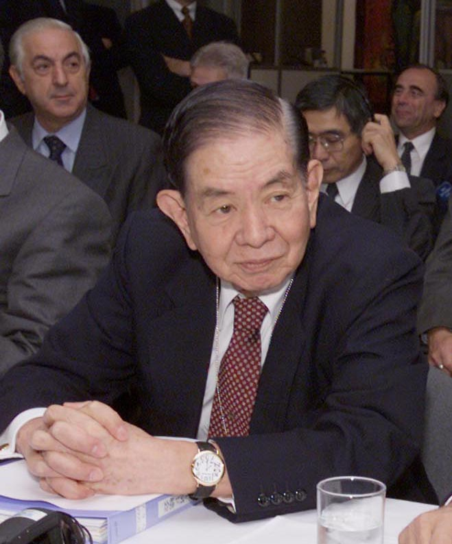 Bank of Japan Governor, Masaru Hayami